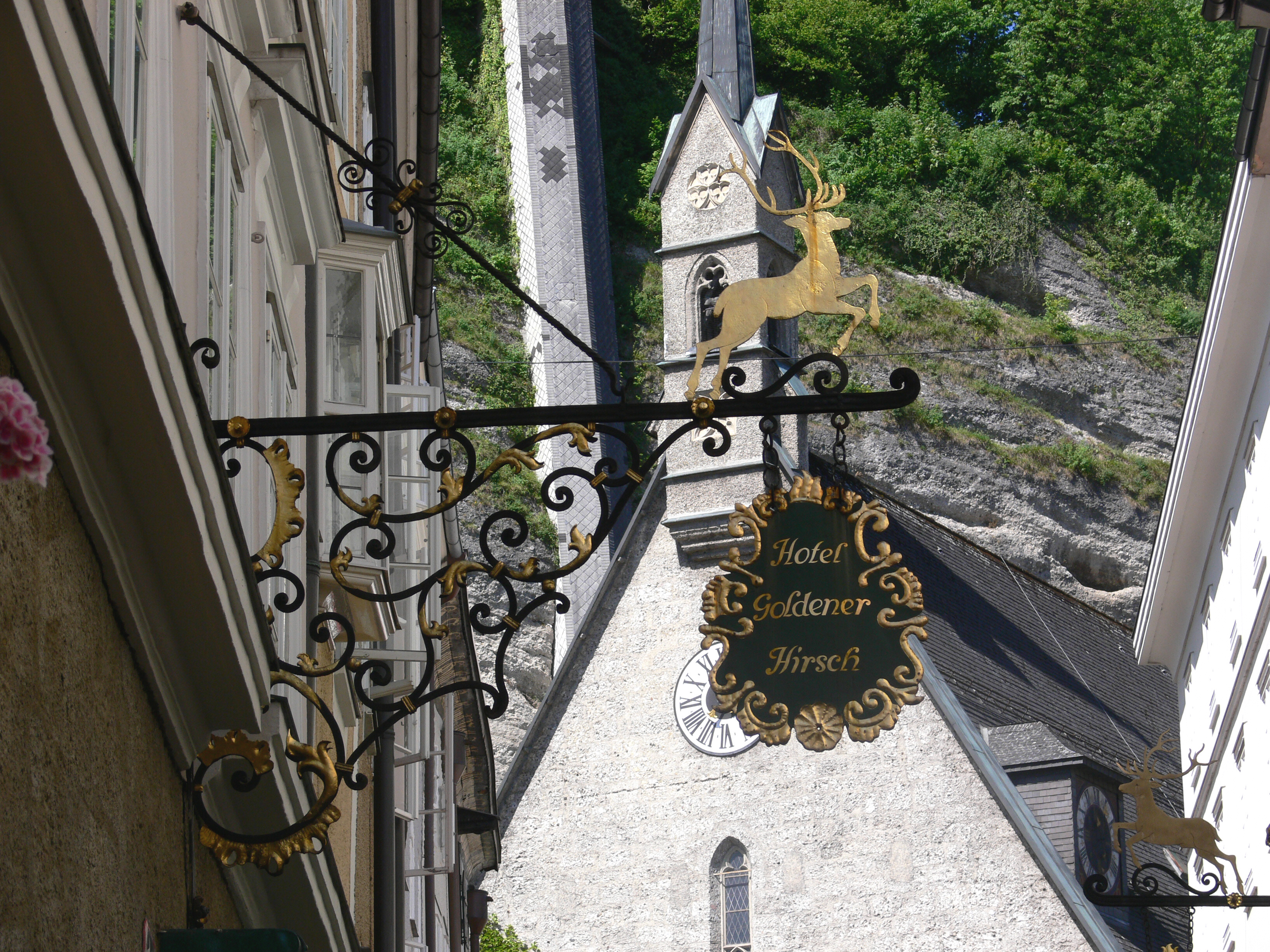 Getreidegasse, Salzburg Wirtshausschild "Goldener Hirsch"